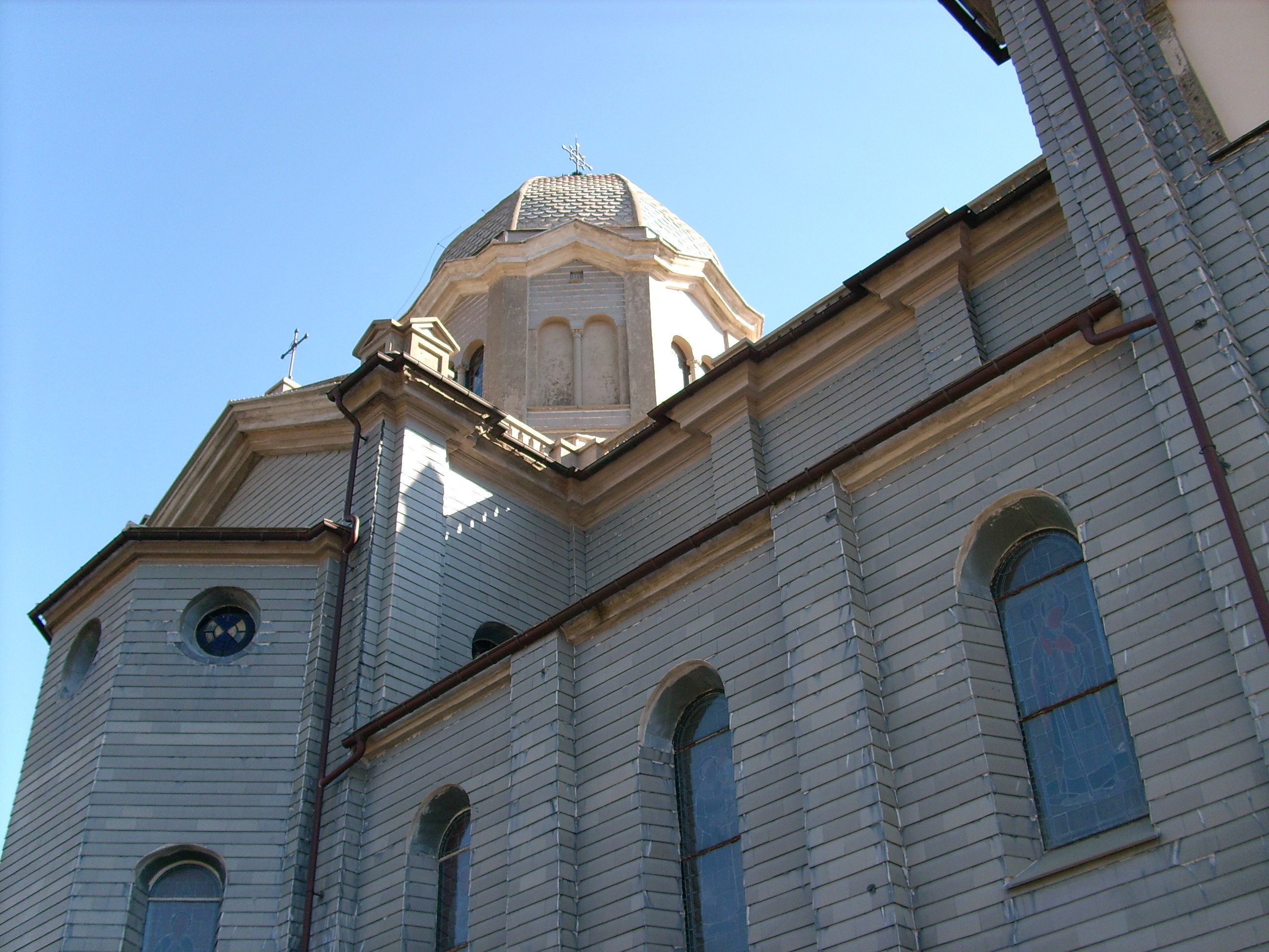 Chiesa di San Giovanni Battista presso Stella San Giovanni, Liguria, Italia